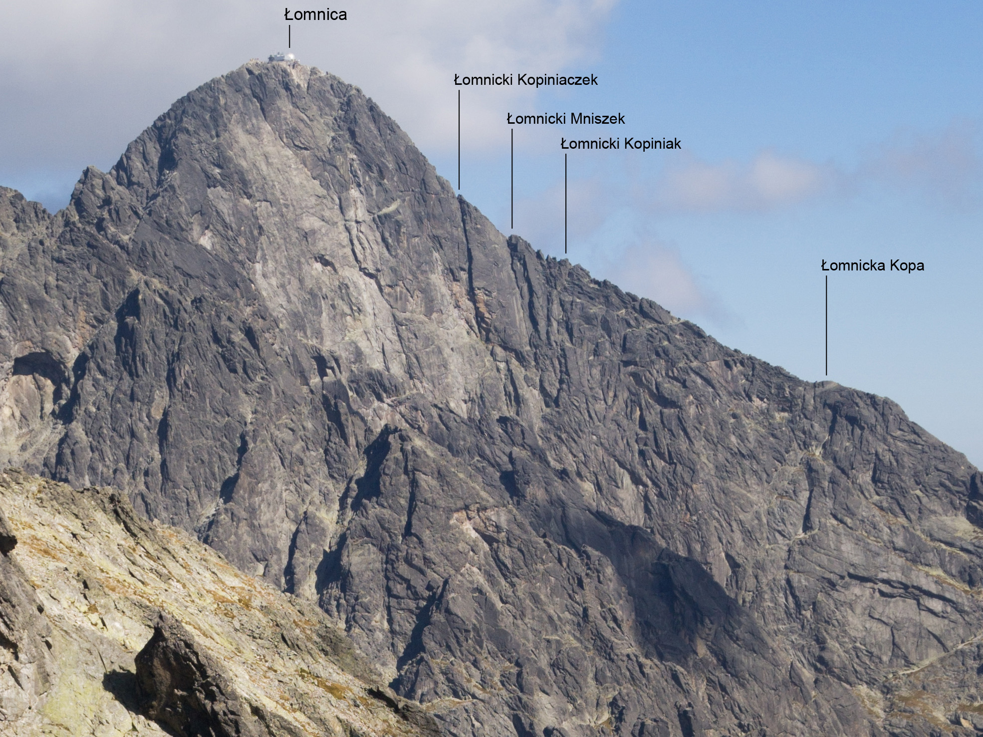 Zachodnia ściana Łomnicy i górna część jej południowej grani.